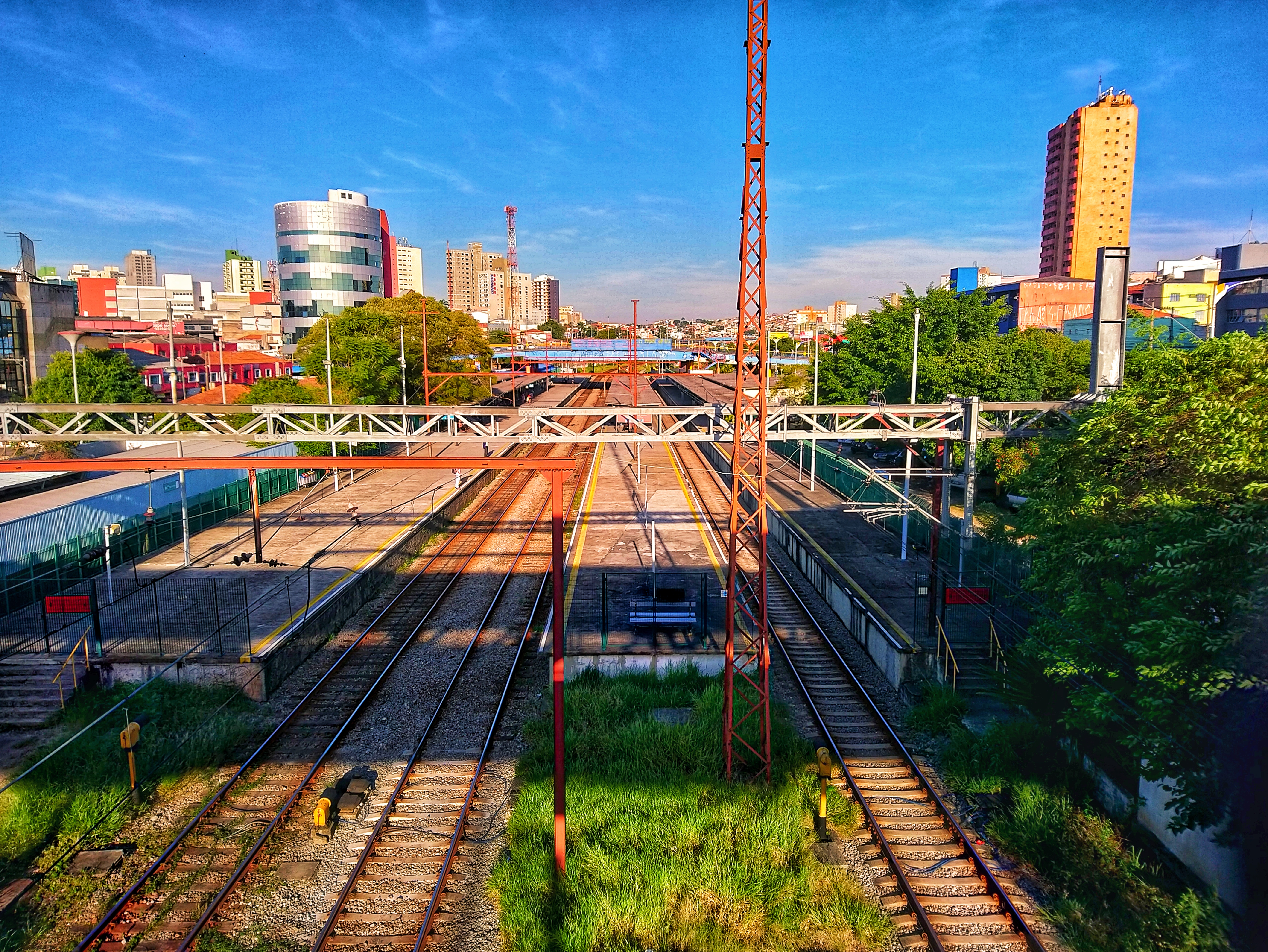 Estação ferroviária de Mauá